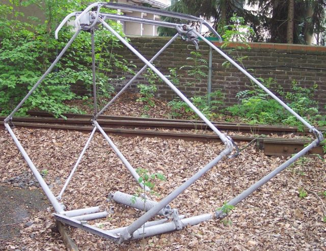 Pantograf.